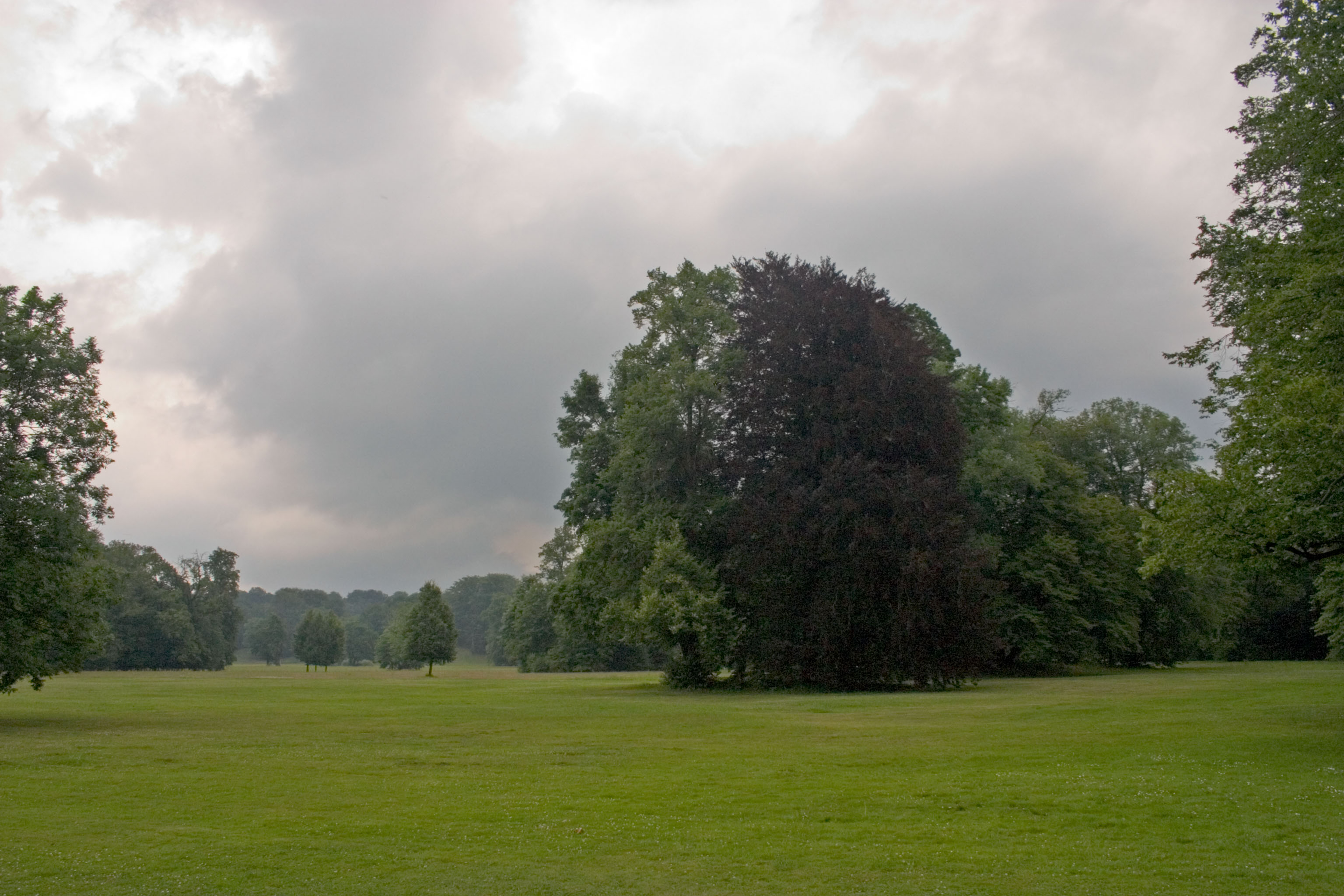 Fürst-Pückler-Park (Park Mużakowski) Author: Adam Kumiszcza